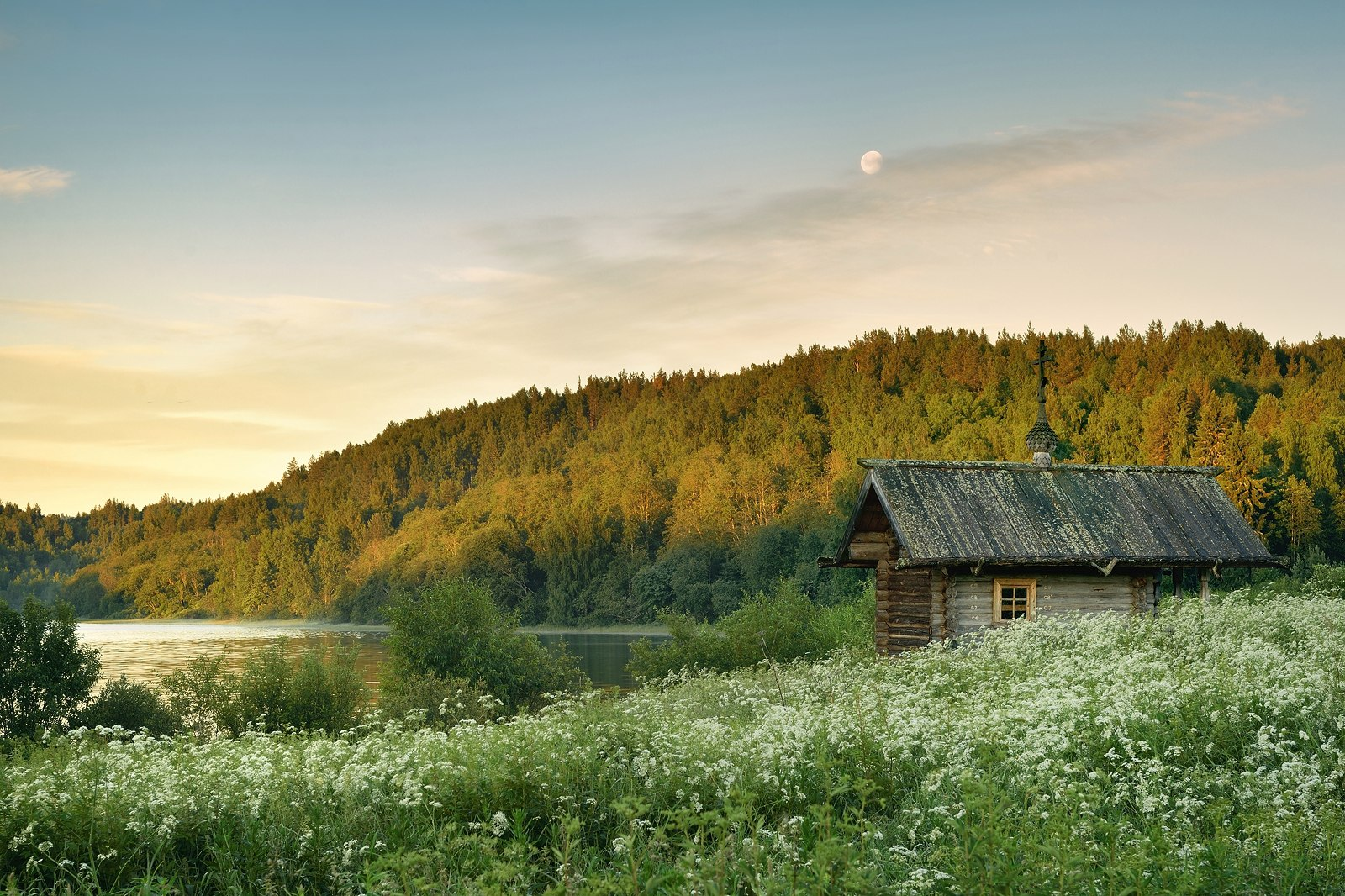 Кенозерский национальный парк: Плесецкий район, Архангельская область This image is related to the protected area of Russia number 2900047